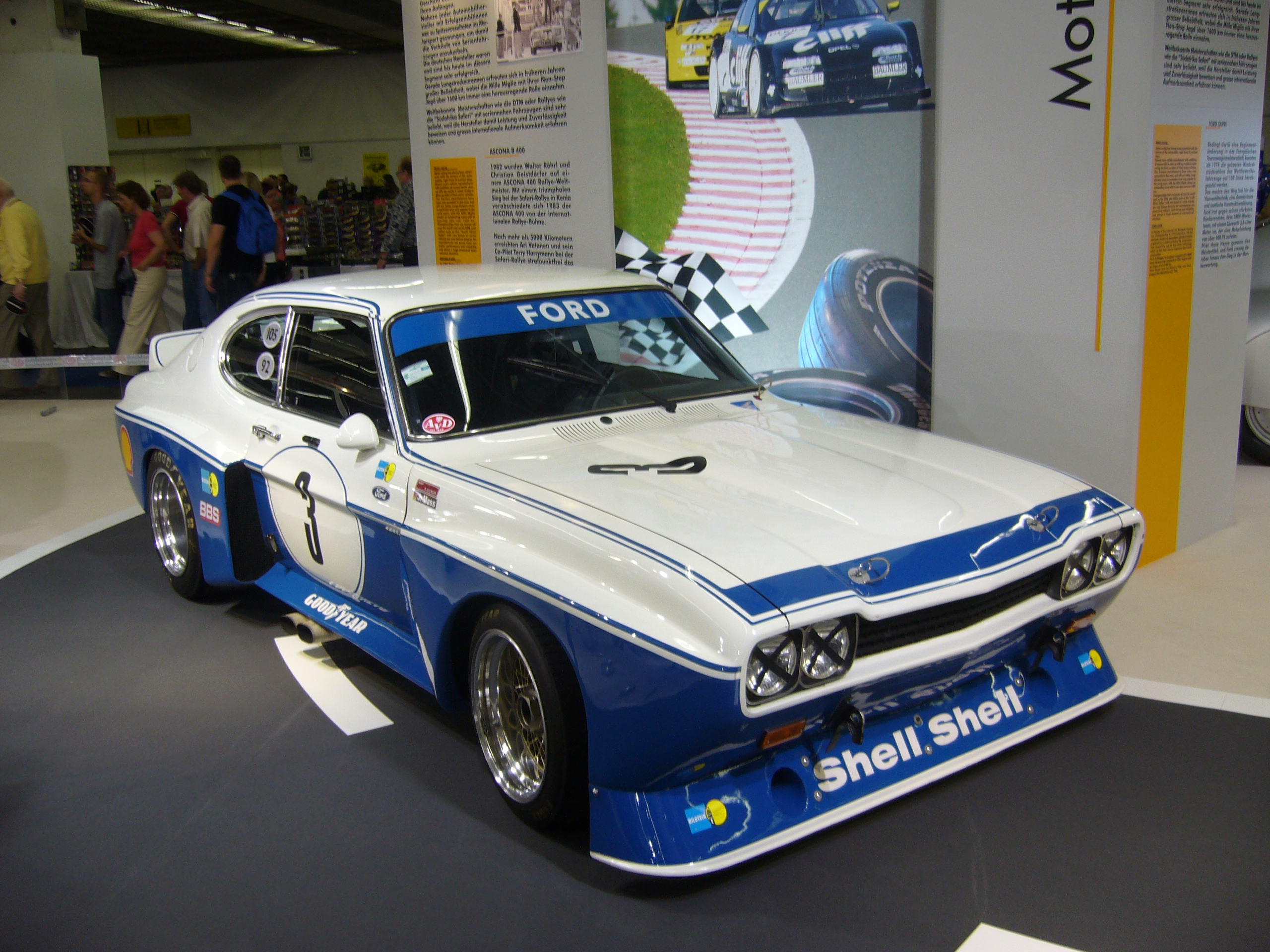 Ford Capri I RS3400